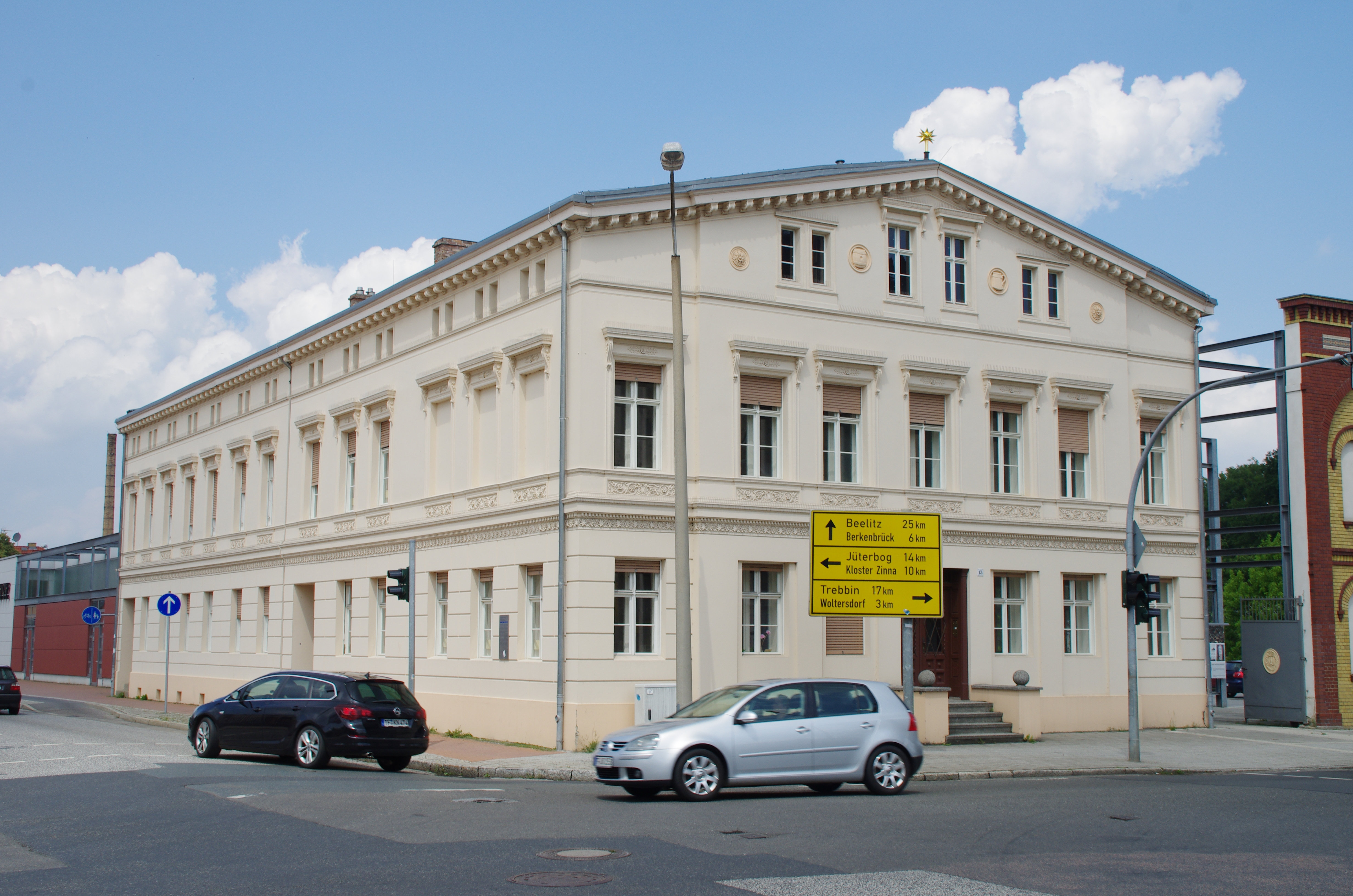 Luckenwalde in Brandenburg. Die alte Likörfabrik steht unter Denkmalschutz.